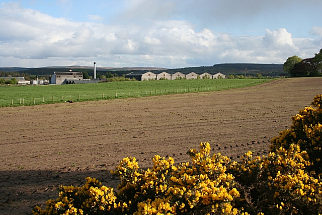 Miltonduff Distillery